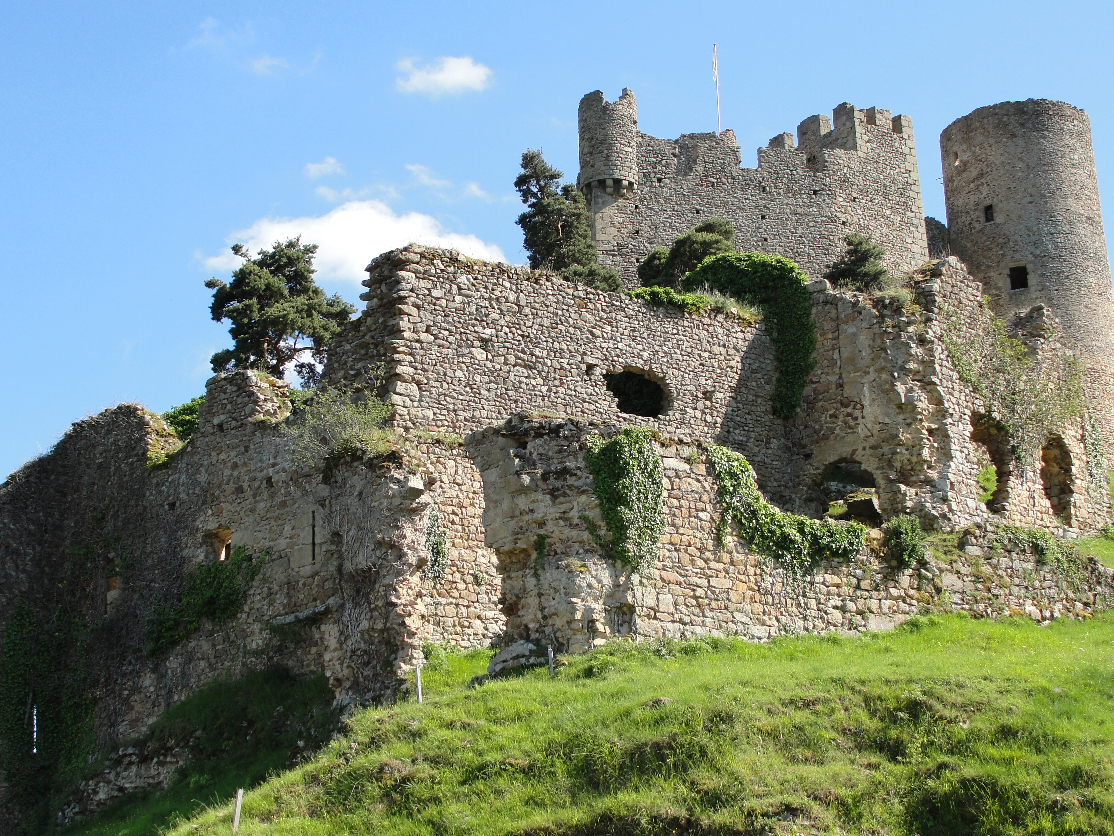 Vestiges de l'ancienne forteresse médiévale de Sail (Loire).